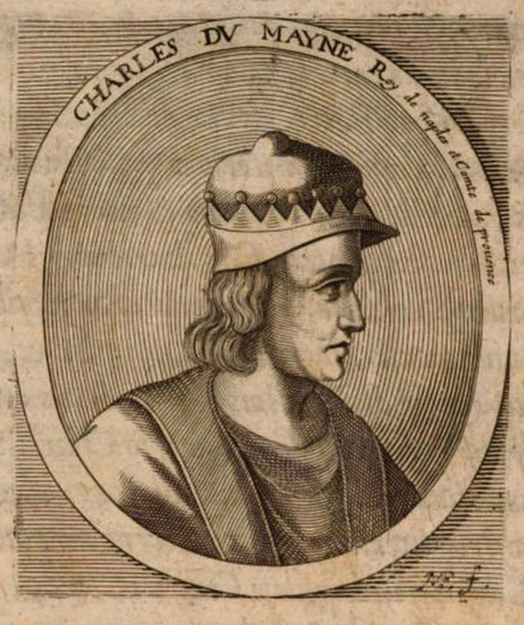 vignette représentant Charles du Maine, roi de Sicile, duc d'Anjou et de Calabre, neveu du roi René.